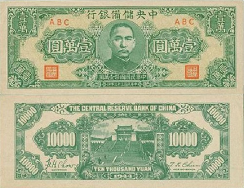 中文（中国大陆）: 汪精卫政权“中央储备银行”发行的一万元钞票